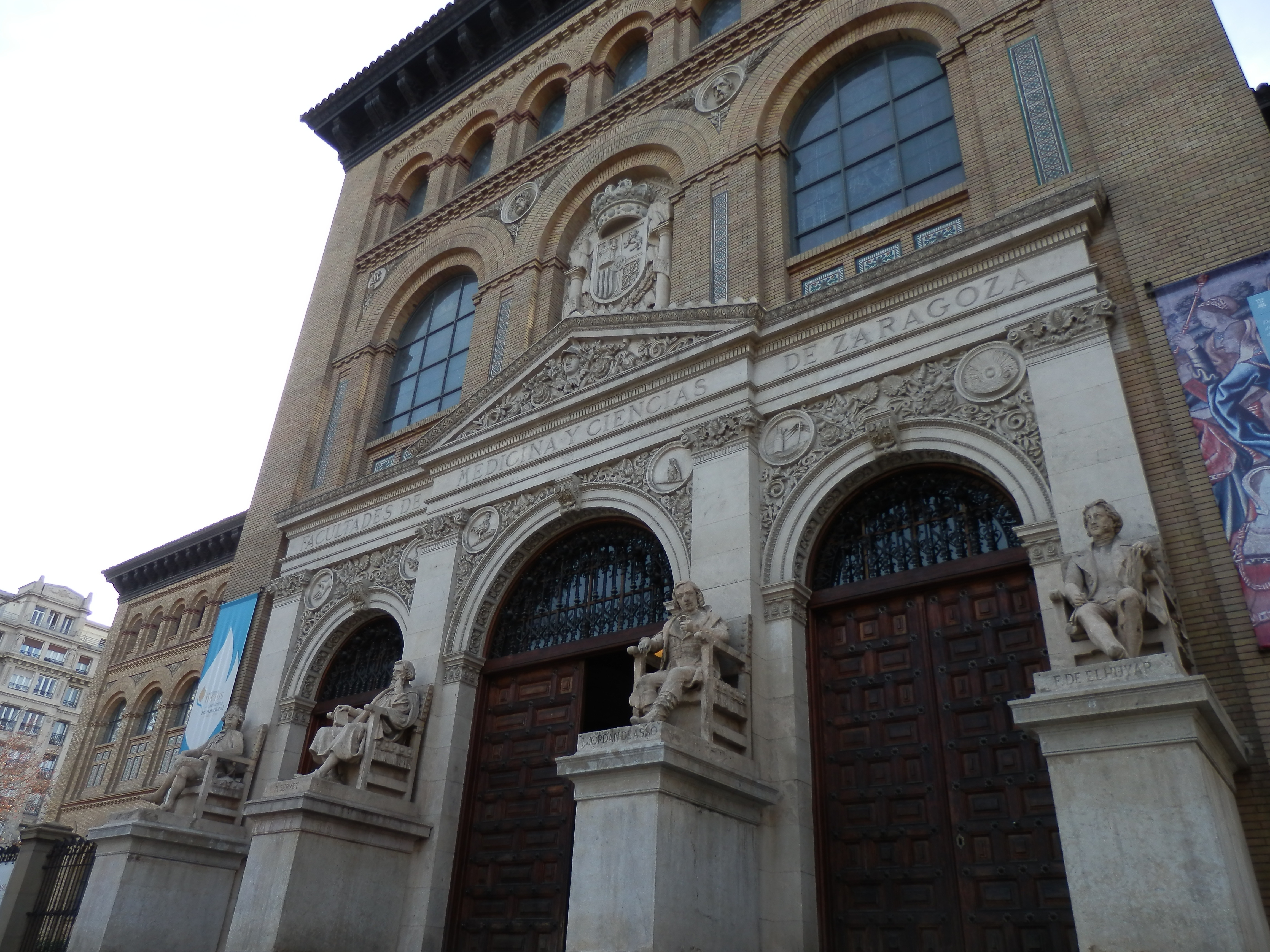 Paraninfo de la Universidad de Zaragoza. Antigua Facultad de Medicina de Zaragoza. Situado en la plaza Basilio Paraíso.